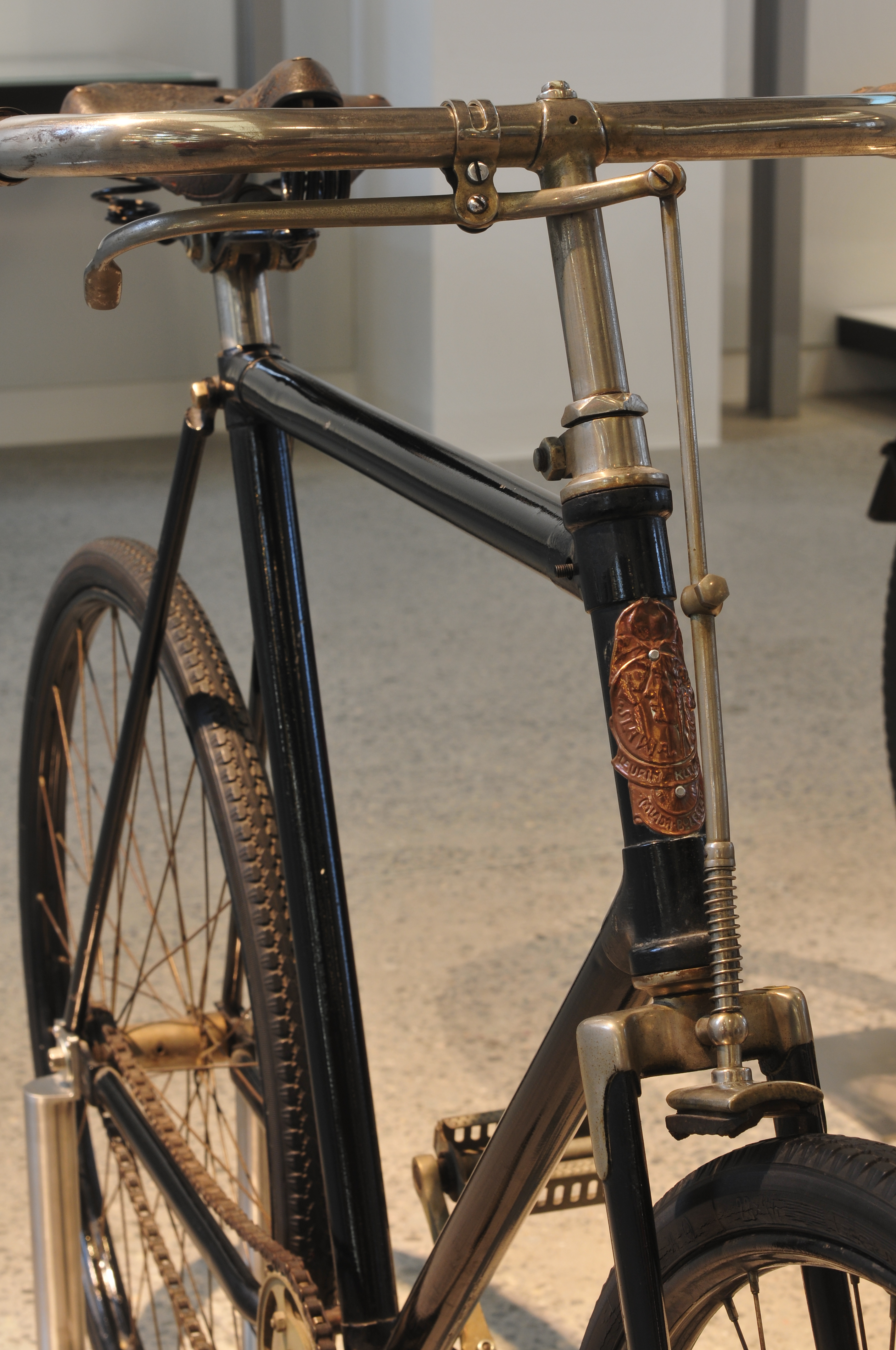 Fototermin Škoda Museum Mladá Boleslav 2013 Fototermin Škoda Muzeum 5. April 2013 in Mladá Boleslav This work is free and may be used by anyone for any purpose. If you wish to use this content, you do not need to request permission as long as you follow any licensing requirements mentioned on this page.